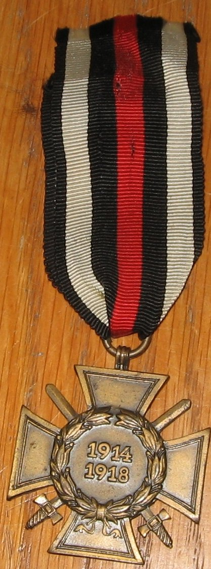 Militärische Auszeichnung Deutschland 1934 Ehrenkreuz des Weltkrieges 1914/1918, in drei Klassen, hier: Ehrenkreuz für Frontkämpfer – mit Schwertern.